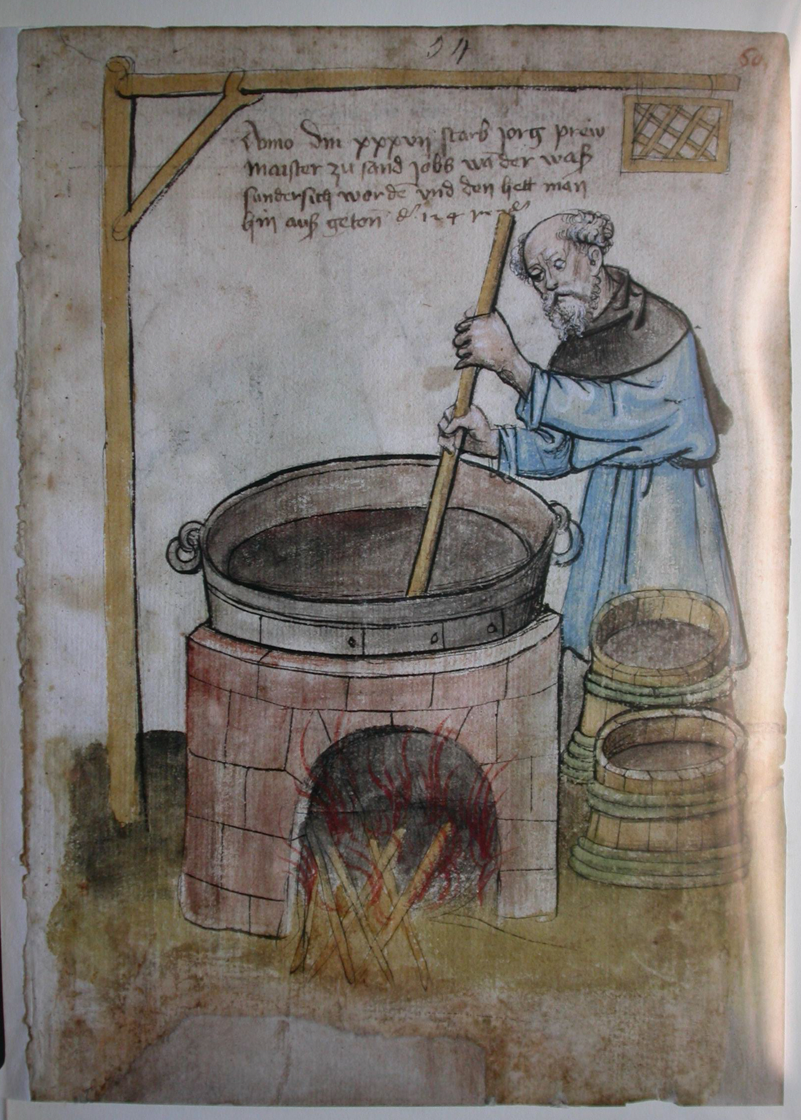 Darstellung des Braumeisters Jorg (Jörg, Georg) aus dem 15. Jahrhundert. Weiterführende Informationen auf nuernberger-hausbuecher.de